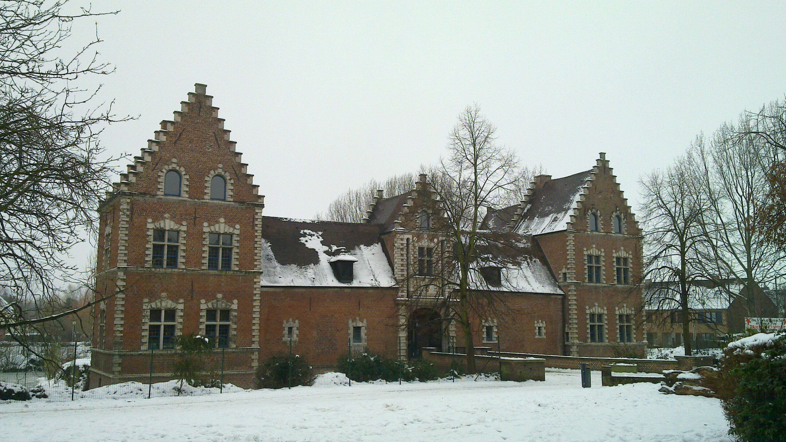 Le château de Flers dans la neige l'hiver, à Villeneuve d'Ascq.